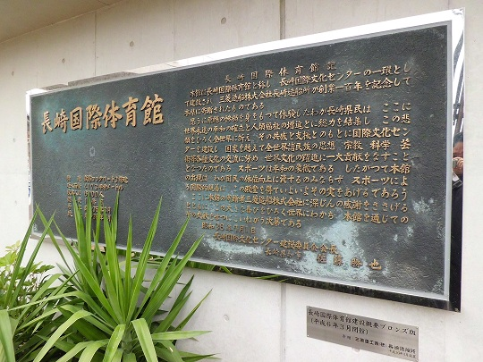 長崎国際体育館閉館に伴い設置された銘板（松山町）